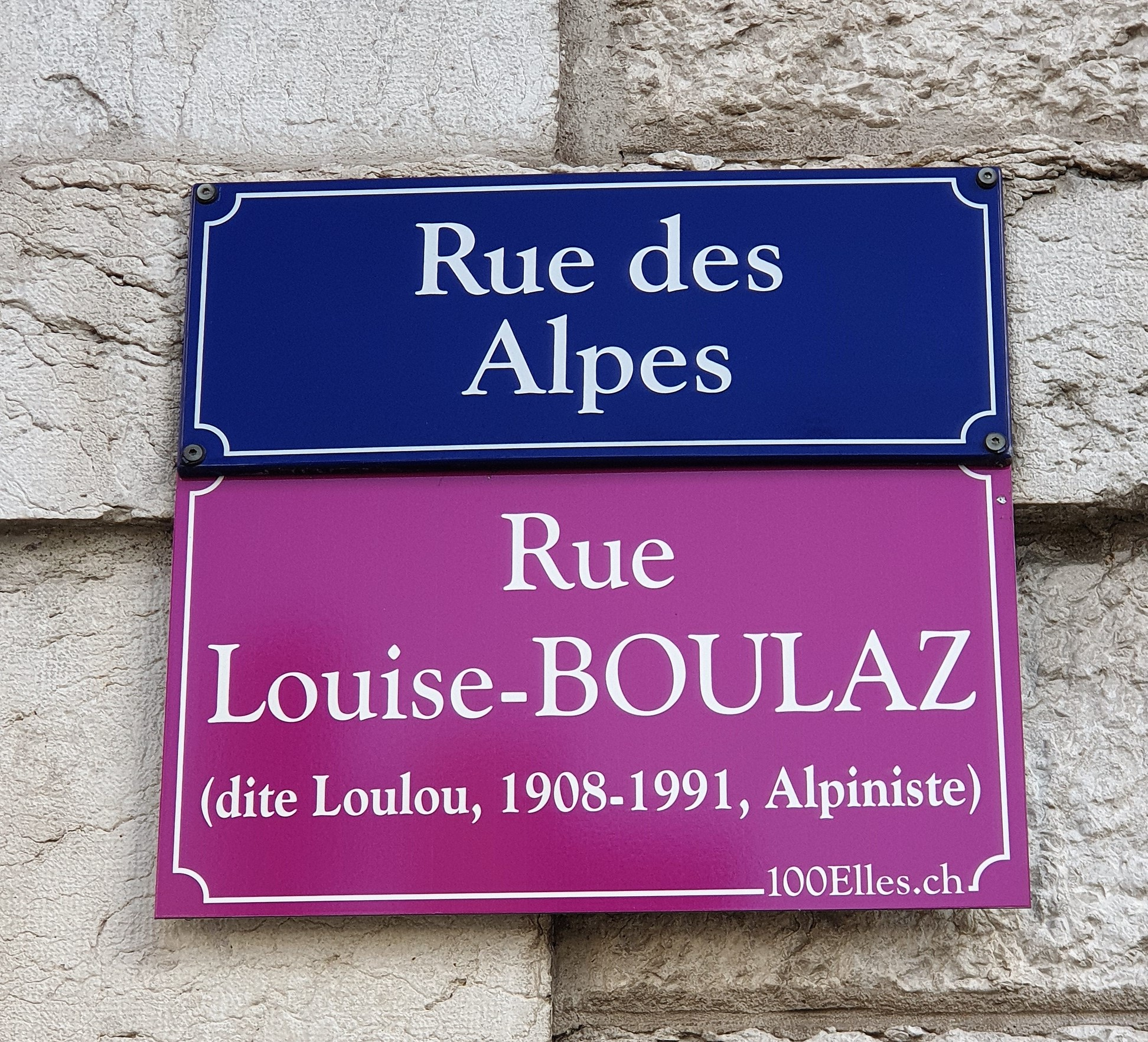 Plaque temporaire de rue apposée dans le cadre du projet 100elles à Genève en 2019